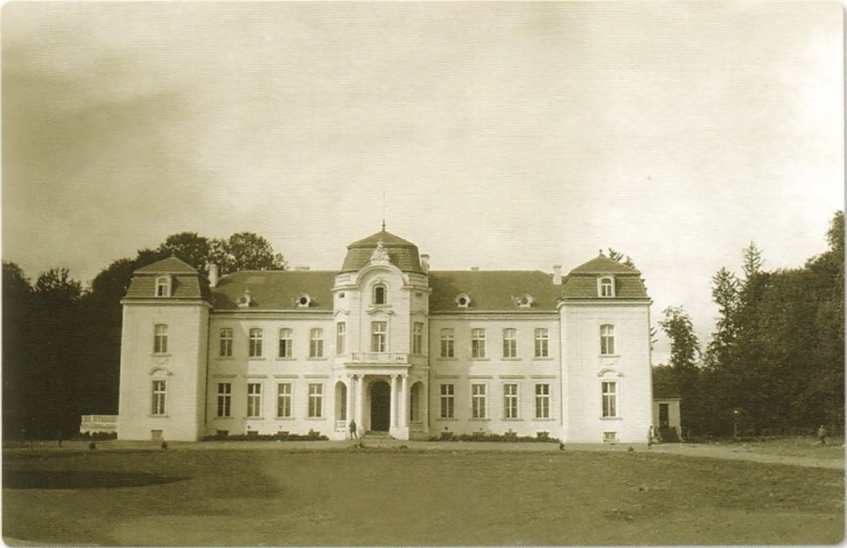 Беларуская (тарашкевіца): Жалудок (Žałudok), палац Сьвятаполк-Чацьвярцінскіх (Śviatapołk-Čaćviarcinski)